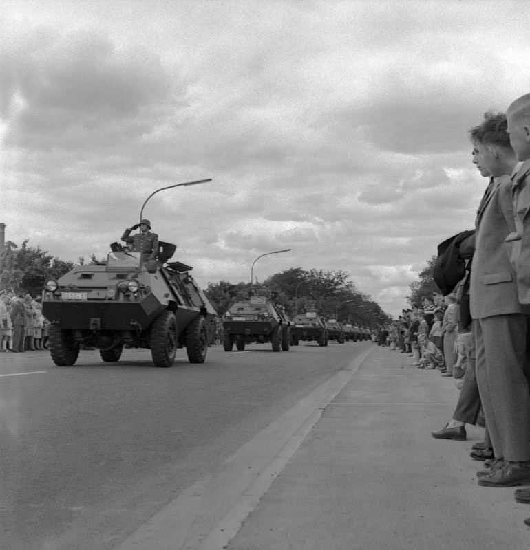 10 jähriges Bestehen des BGS: Vorbeimarsch einer mot. Einheit Lübeck